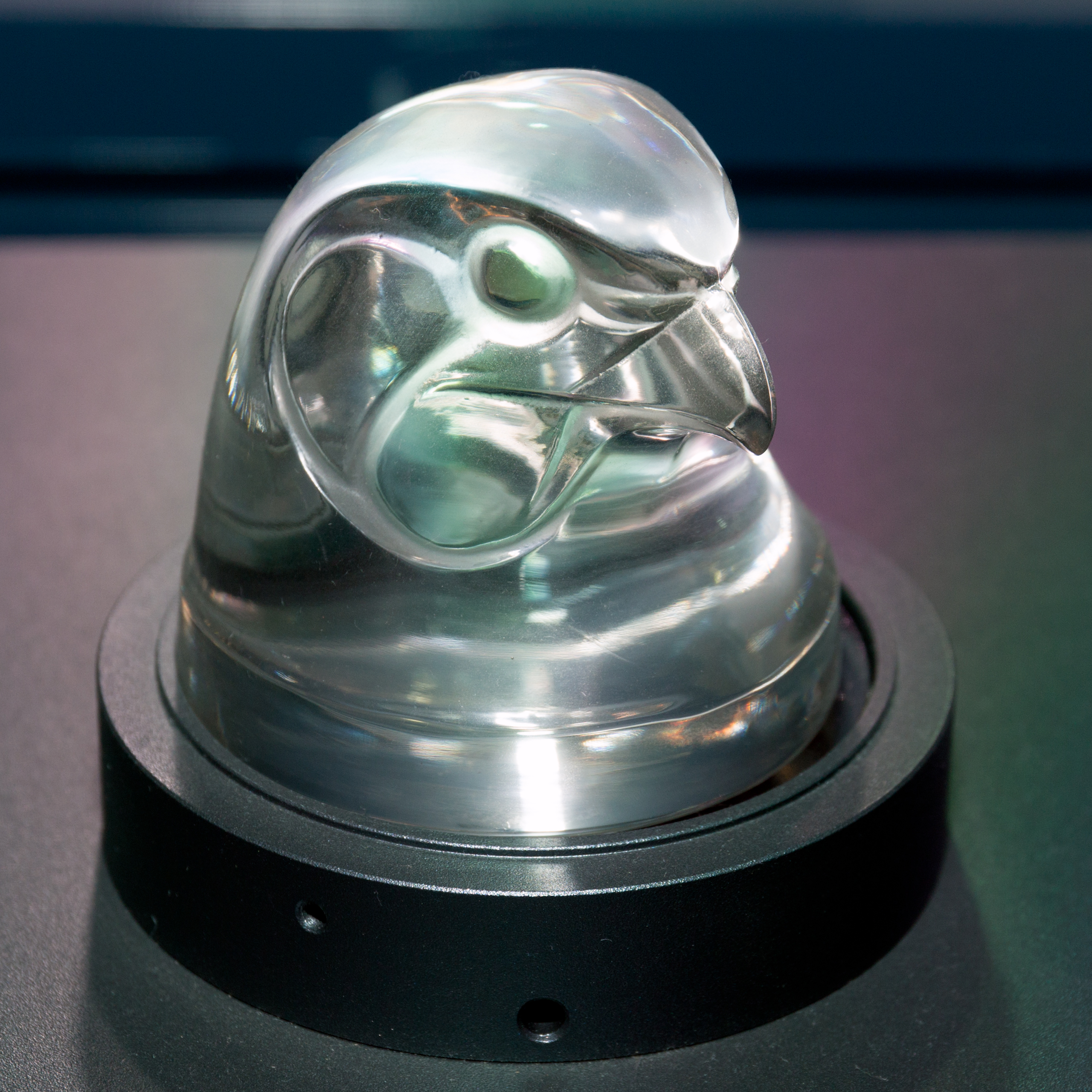 Tete D'Epervier (1928)